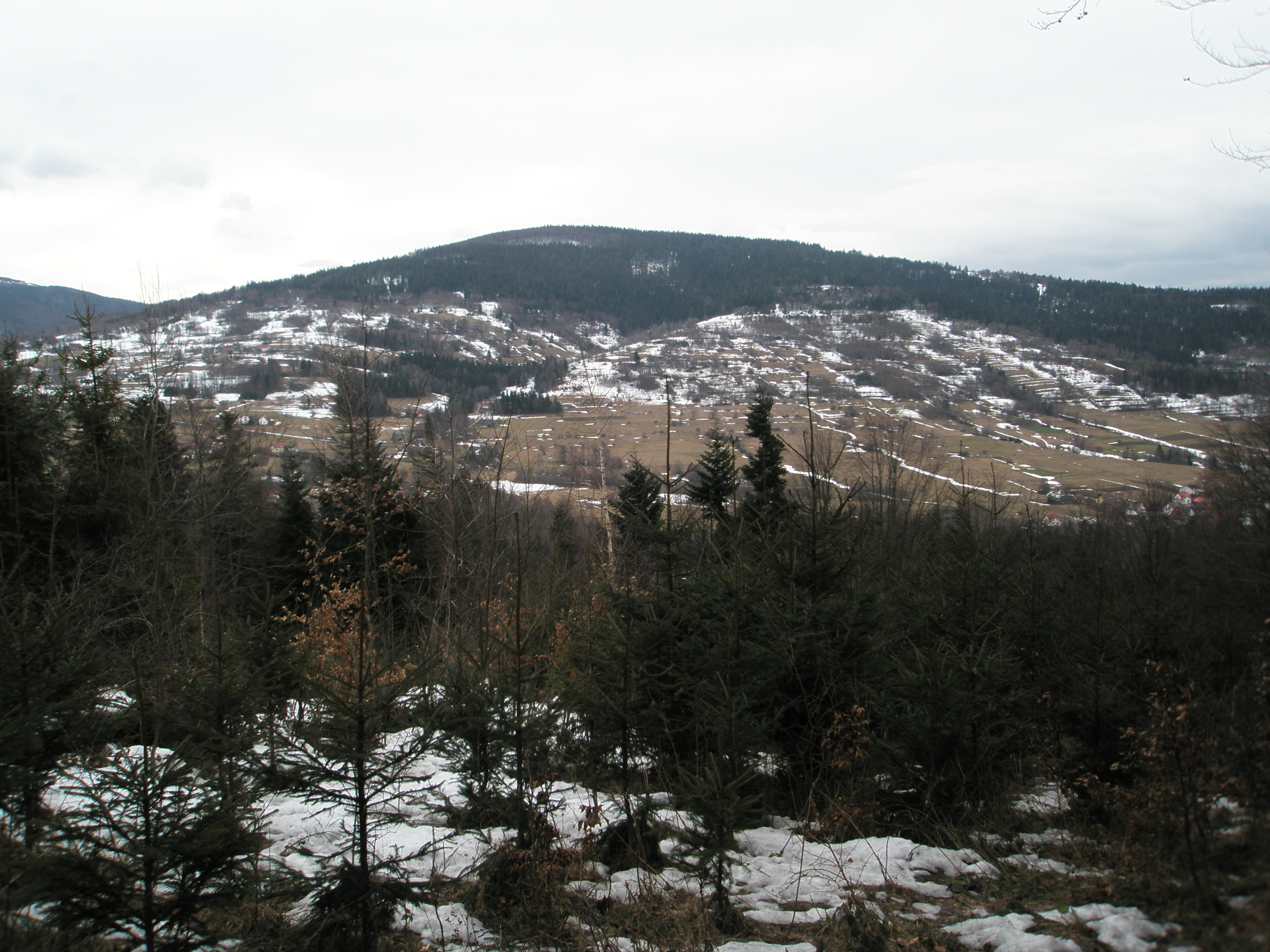 Widok z polany pod Wytrzyszczoniem na Lachów Groń, poniżej Koszarawa.